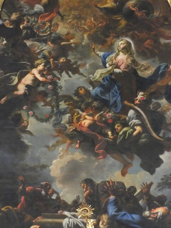 Krzeszów, bazylika, Wniebowzięcie NMP, obraz w ołtarzu głównym autorstwa P. Brandla